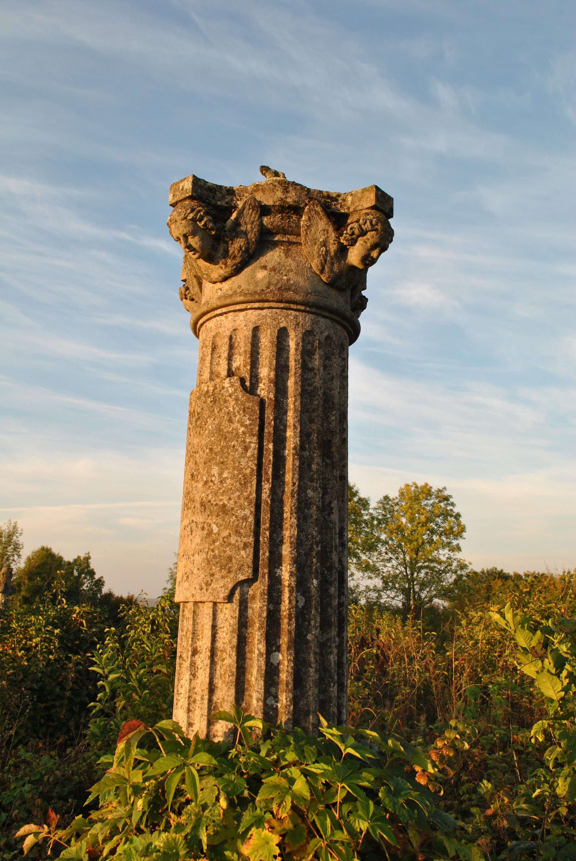 Вірменсько-польське кладовище з каплицею баронів Блажовських у селі Язловець Бучацького району Тернопільської області.